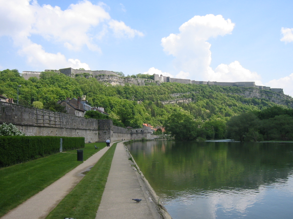 Citadelle de Besançon vu depuis le Doubs. Dans son aspect actuelle, elle a été construite par Vauban, peut après la conquête de Besançon par Louis XIV en 1668. Avant celle-ci, il existait une forteresse beaucoup plus petite de l'époque gallo-romaine (il existe encore des vestiges de temples)